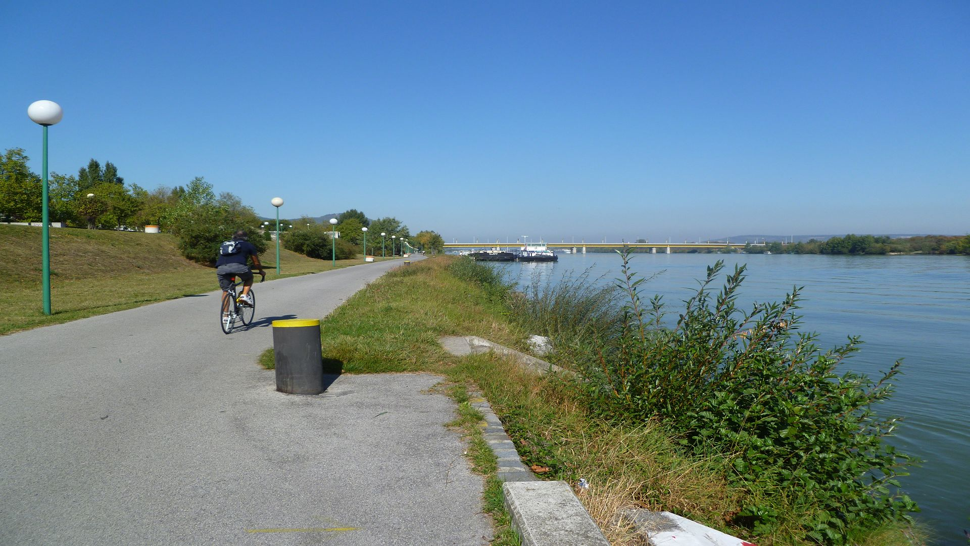 Donauradweg in Wien